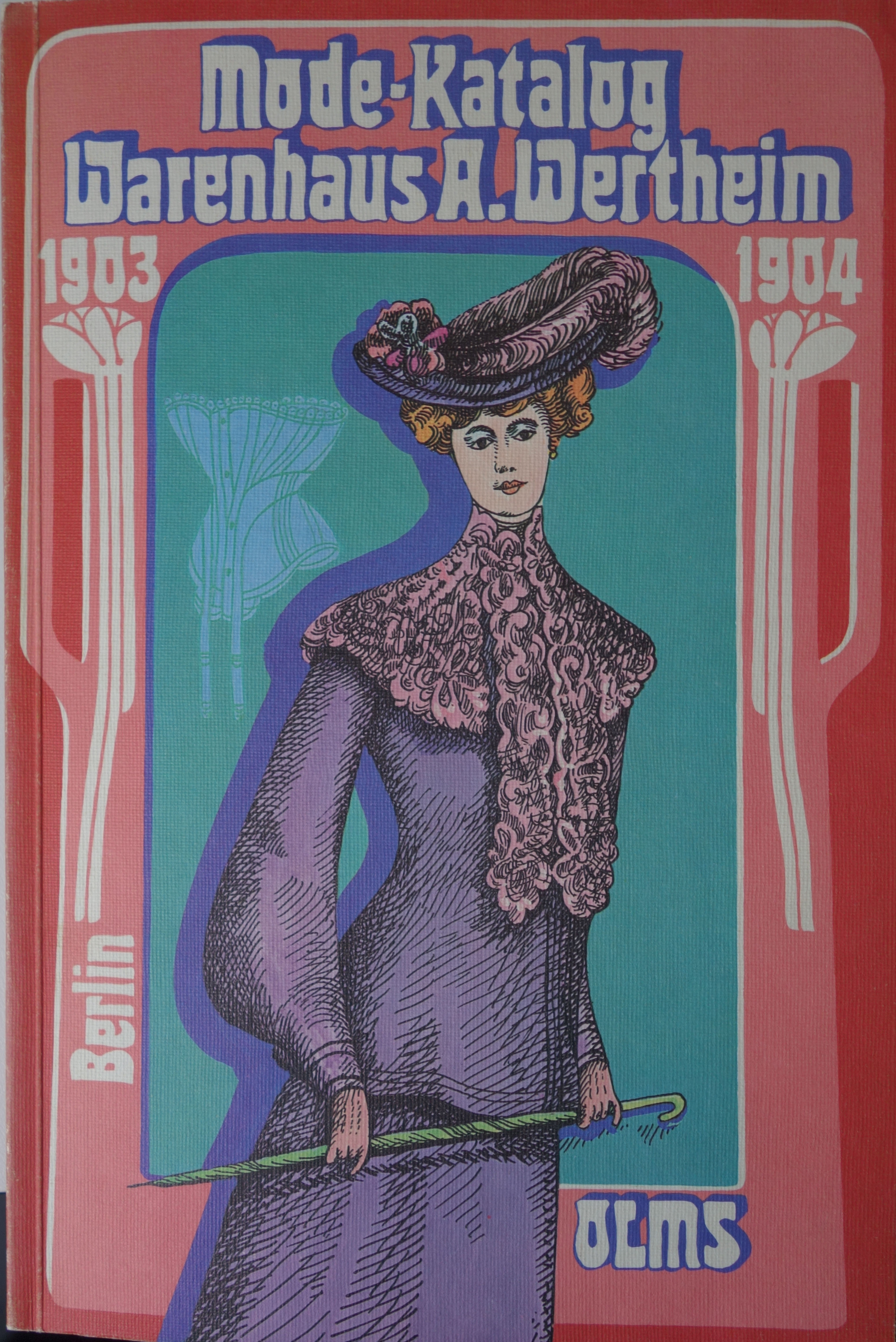 Textilfabrik Cromford in Ratingen, Textilmuseum. Mode-Katalog Warenhaus A. Wertheim, Berlin, 1903-1904. Titelseite.